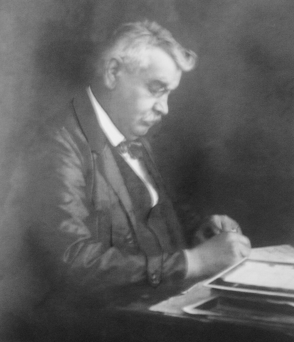 František Obzina - knihtiskař (Vyškov- czech republic)